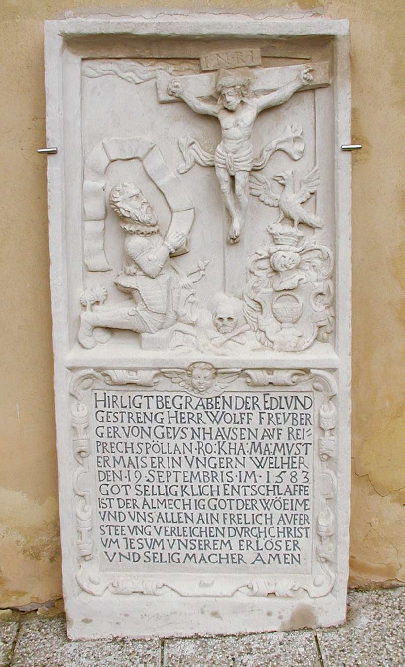 Grabstein Geusenhausen an der Pfarrkirche Frauendorf